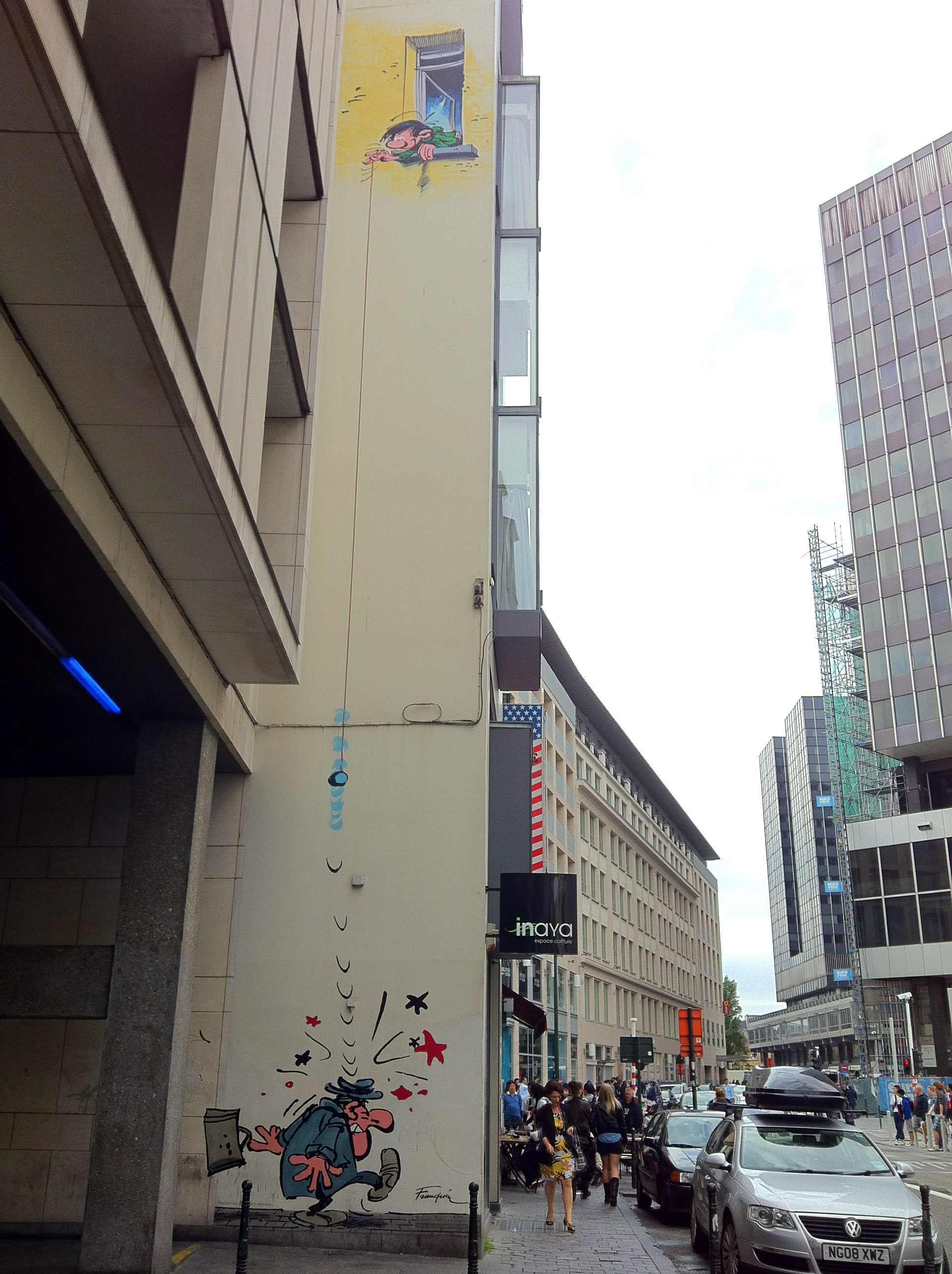 Gaston Lagaffe. Comicwand in der Rue de l'Ecuyer / Schildknaapstraat in Brüssel (Comic-Strip-Route).